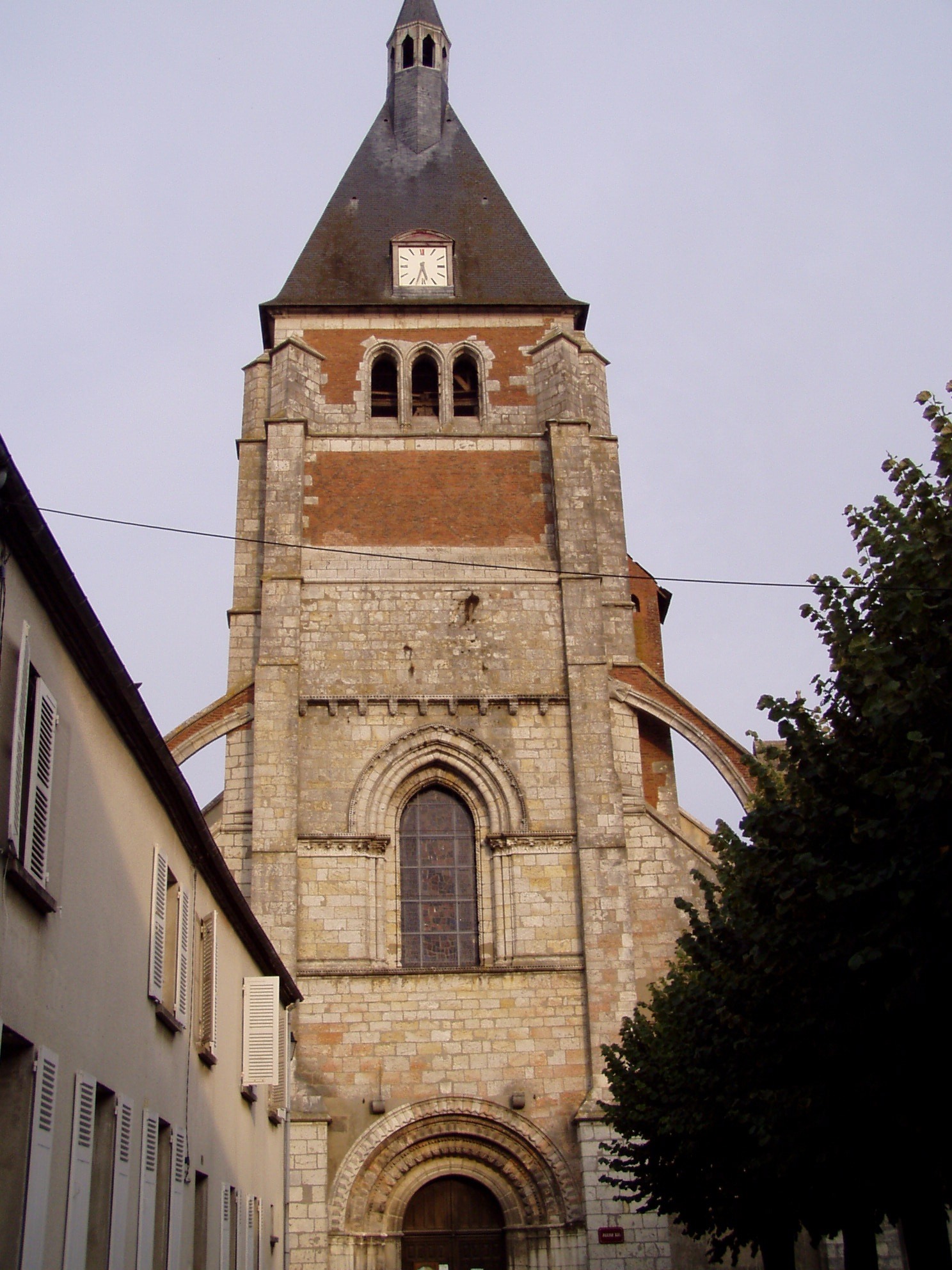 clocher de l'église de Lorris dans le Loiret (France)